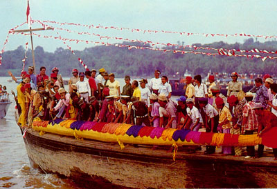 Mengulur Naga, salah satu prosesi dari Erau